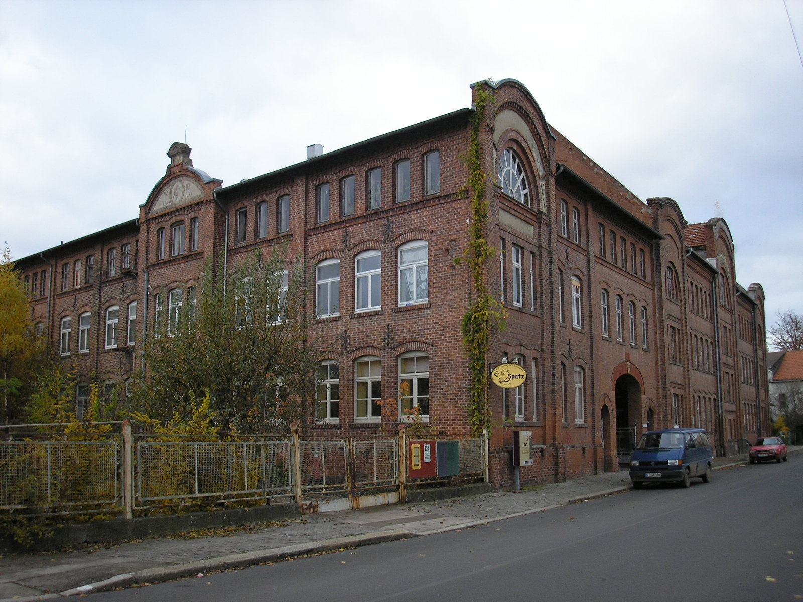 Die Puppenfabrik in Waltershausen (Thüringen), erbaut 1902, jetzt KoWa (Kommune Waltershausen).